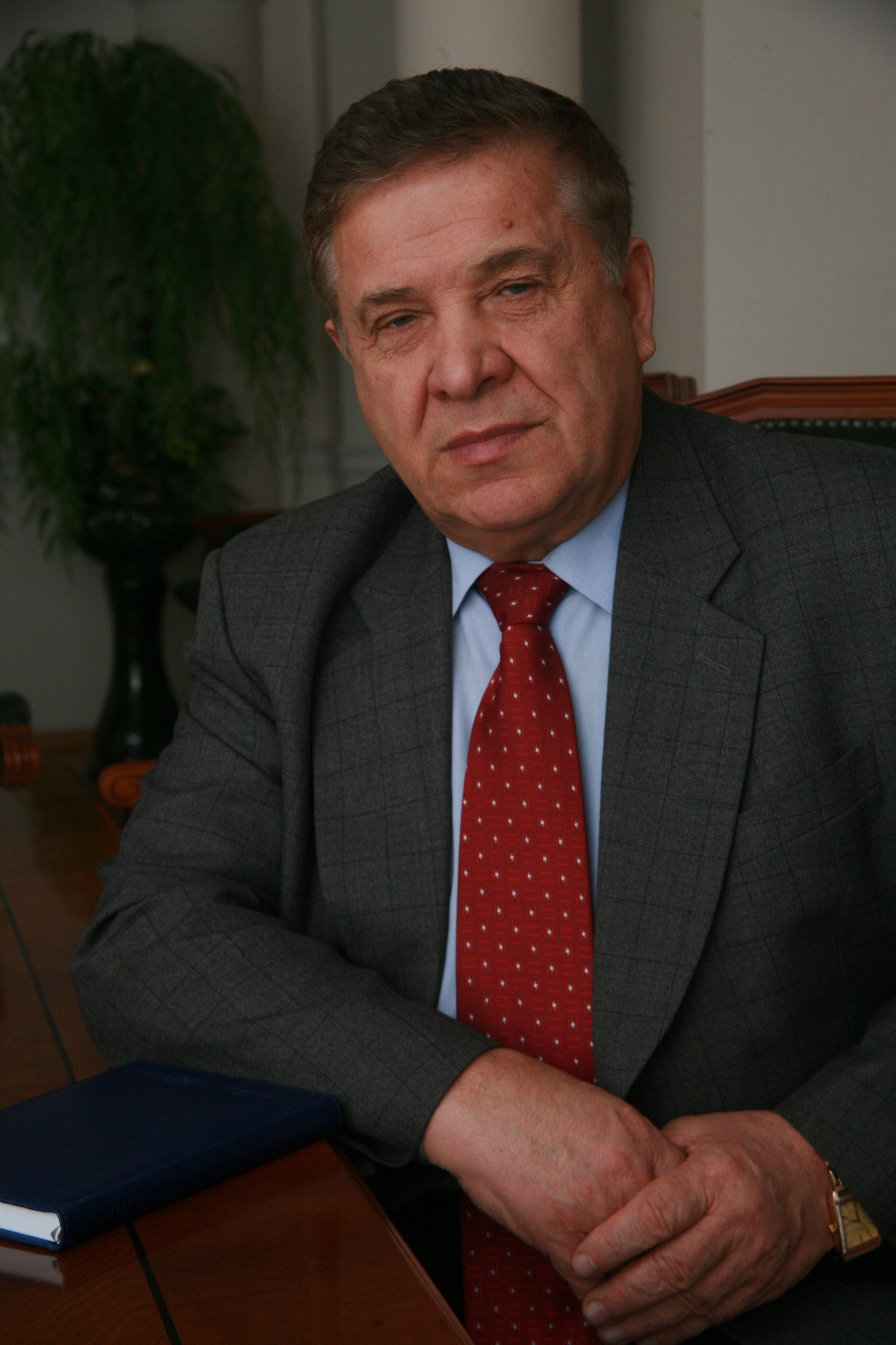 Изображен Крюков Н.Е